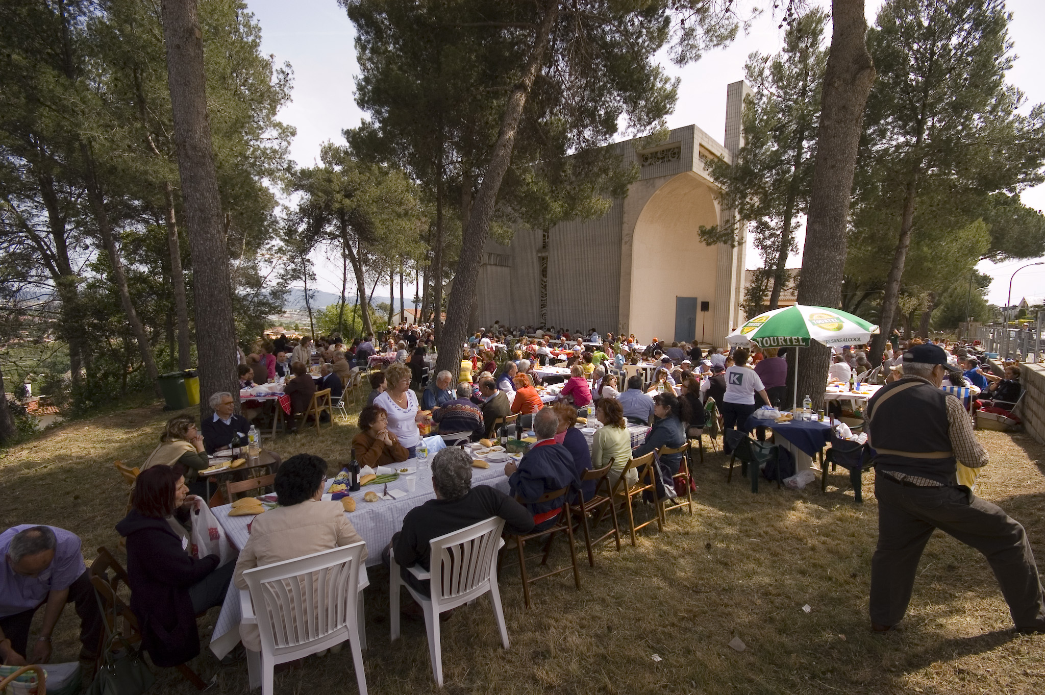 Arrossada popular al 2006 a l'Ermita de la Mare de Déu de Montserrat